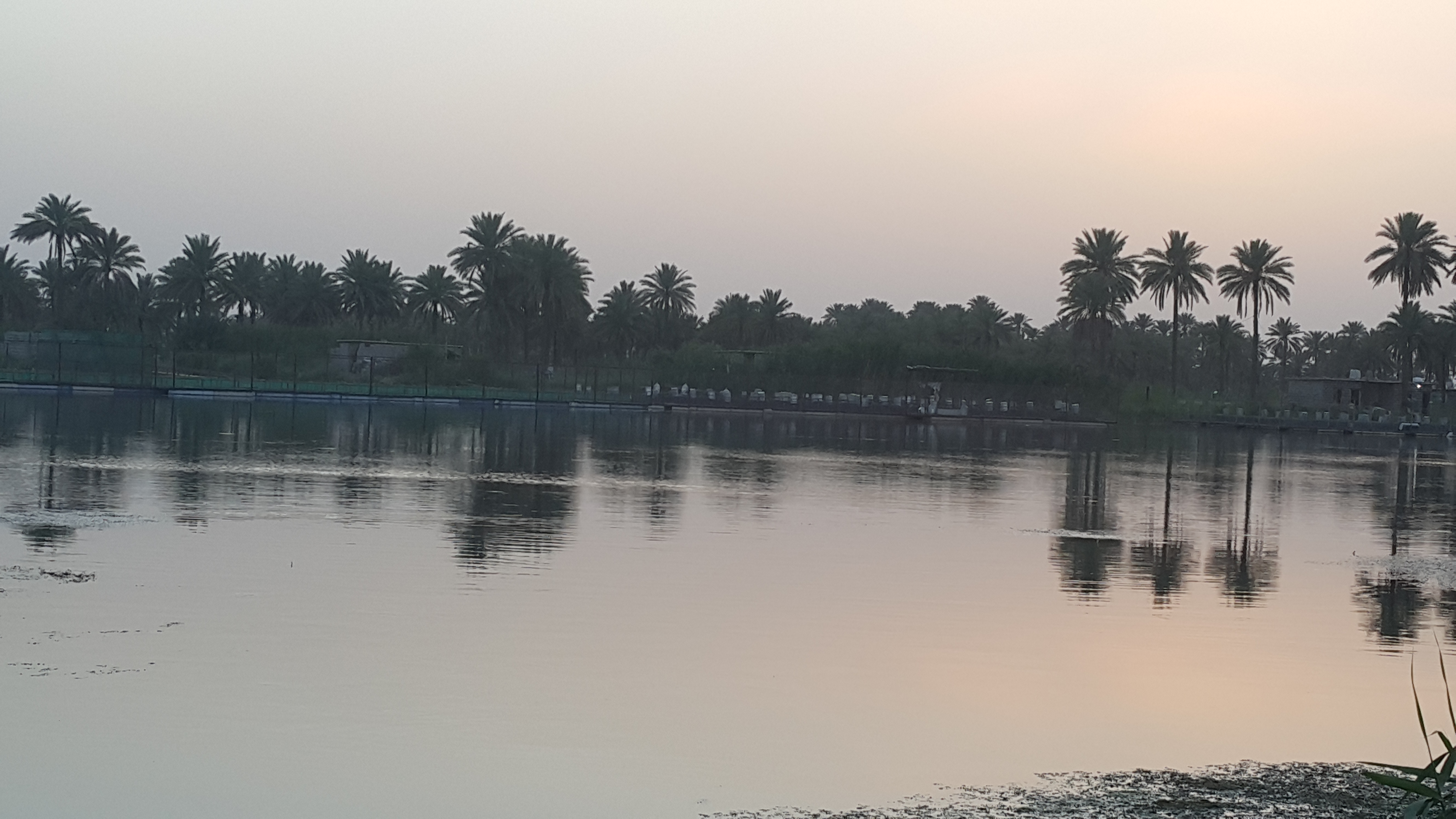 نهر الفرات وهو يمر بمحافظة بابل في المسيب